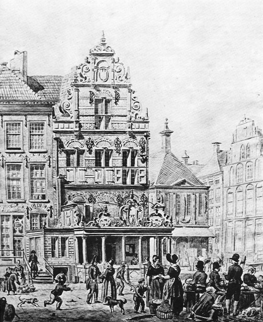 Het Goudkantoor op de Grote Markt in Groningen